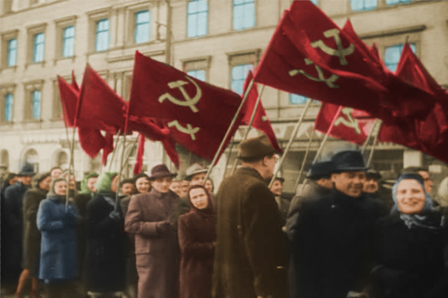 Comunistas en Praga